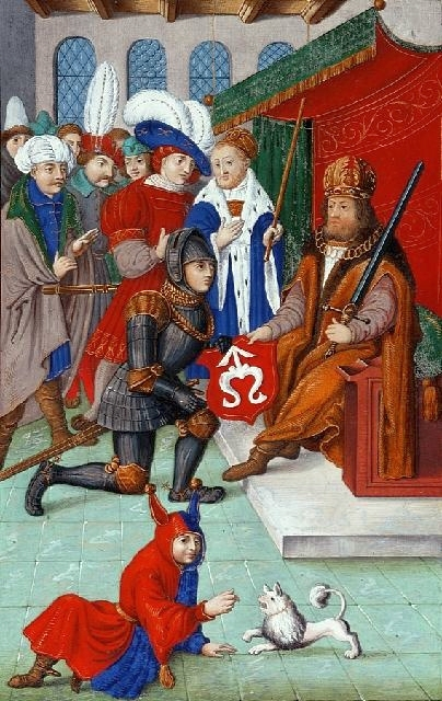 Miniatura "Nadanie herbu protoplaście Odrowążów" w "Liber Genesos ilustris Familiae Shidlovicae", XIX-wieczna kopia